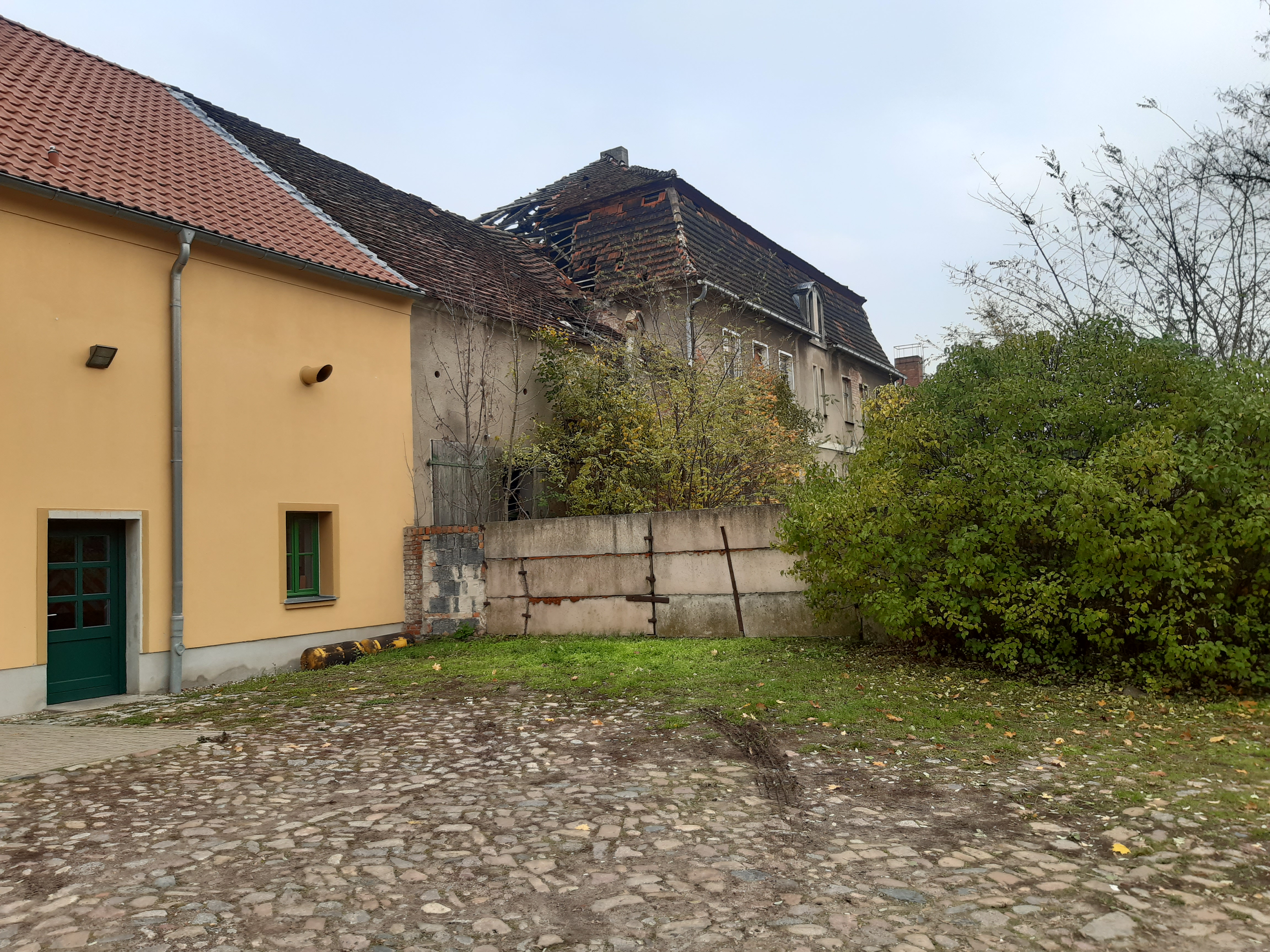 Gutshof